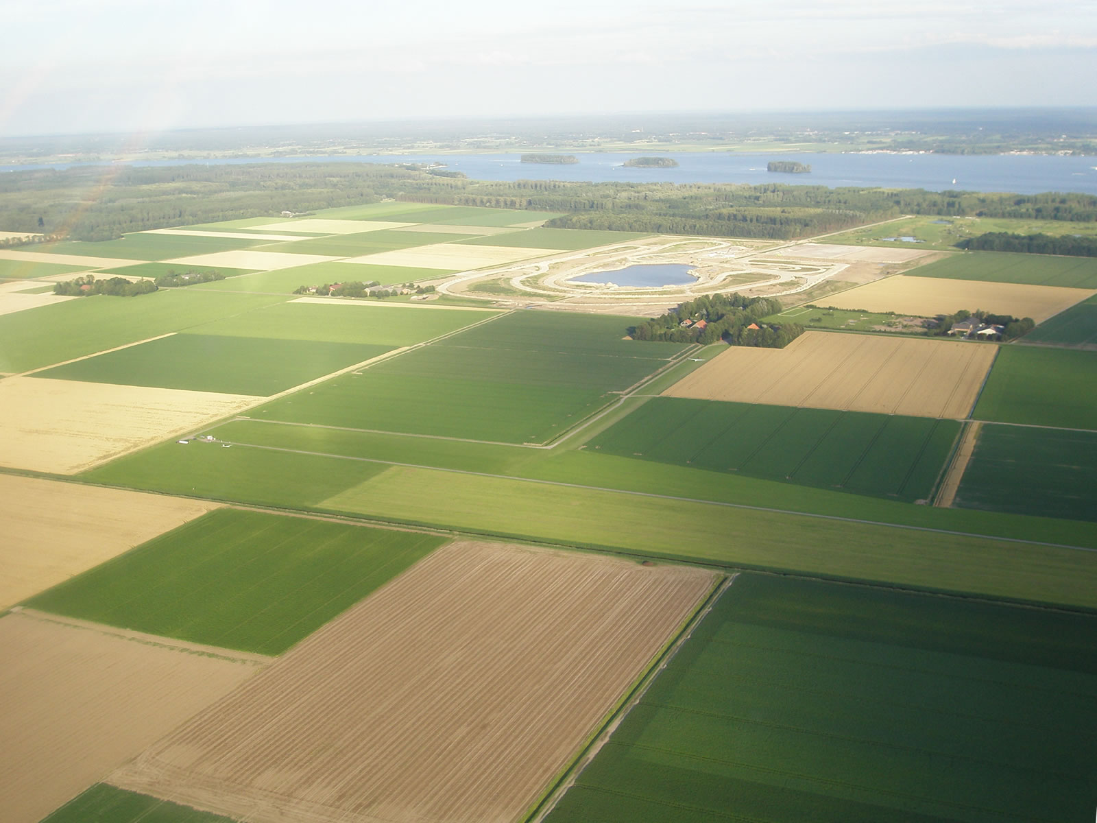 Zweefvliegveld 'Larserveld', thuisbasis van ZCFlevo . Op de achtergrond is tevens de ijsbaan FlevOnice te zien.